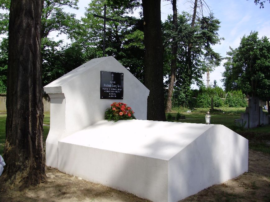 nagrobek pastora Fryderyka Tuve na cmentarzu ewangelickim w Aleksandrowie Łódzkim 2011